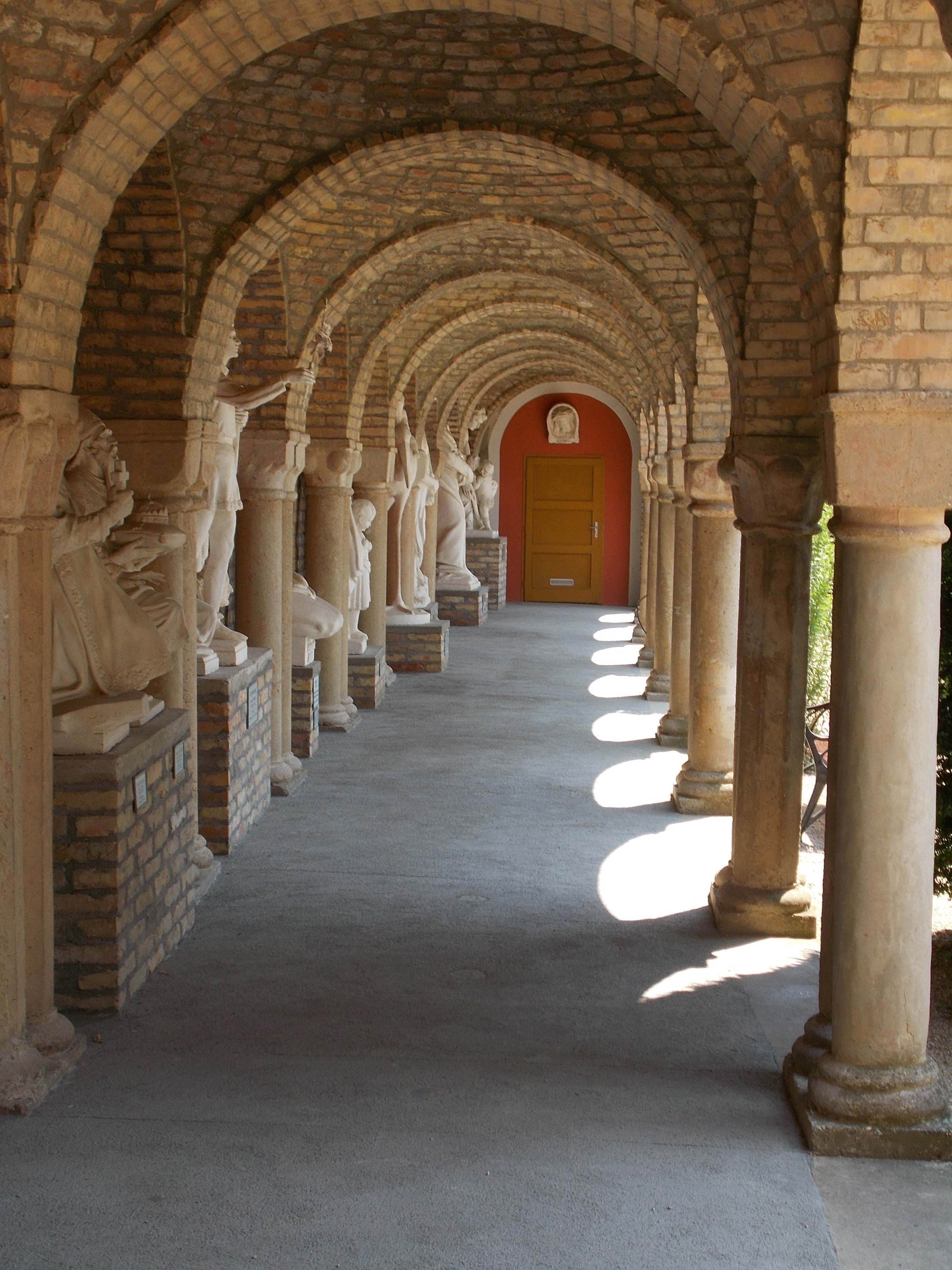 Bory vár. Keleti árkád. - Magyarország, Fejér megye, Székesfehérvár, Öreghegy, Máriavölgy út 54